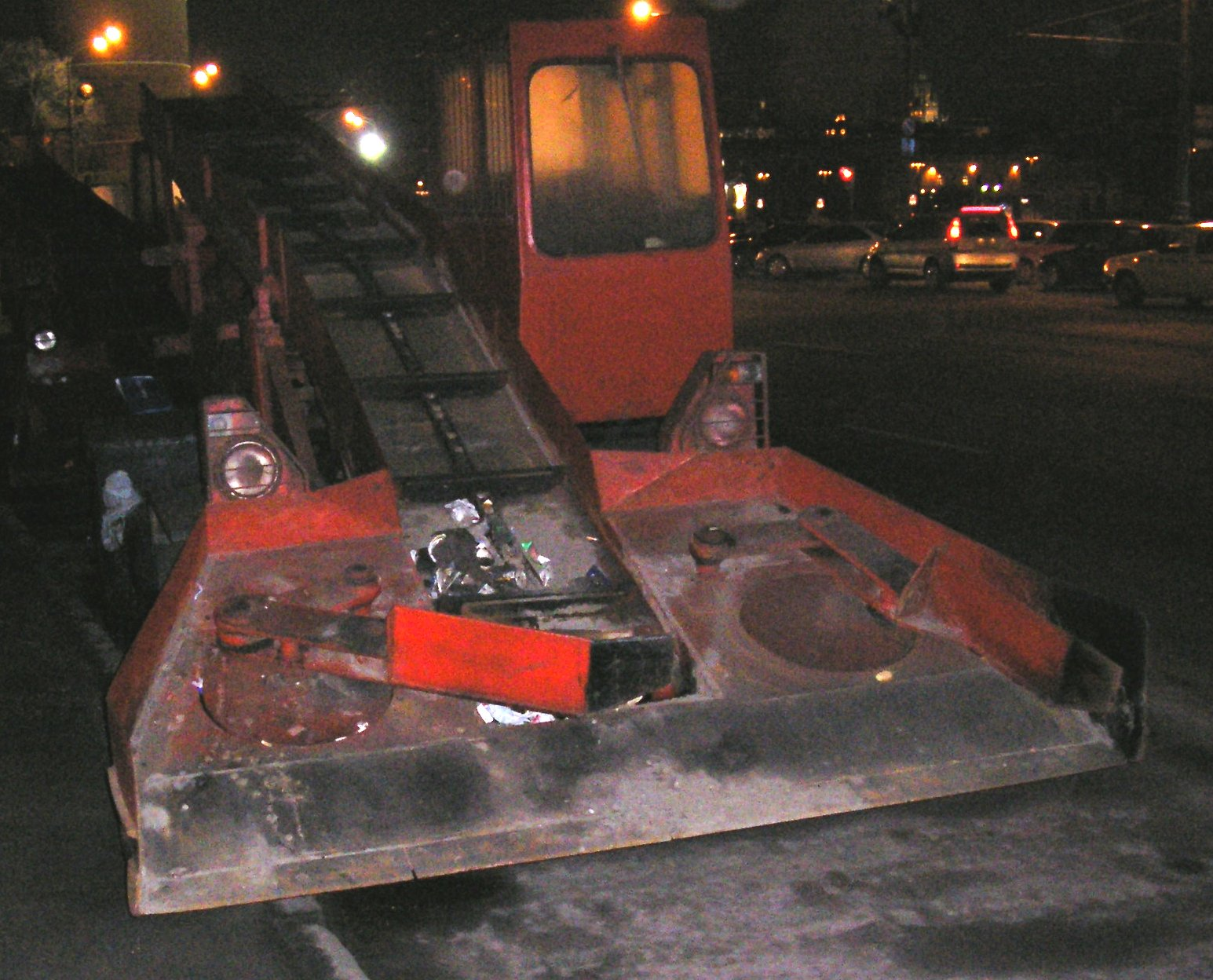 Déneigeuse-avaleuse soviétique (photographiée à Moscou, sous le Grand Pont de Pierre). Les deux bras articulés ramènent la neige sur le tapis roulant, au bout duquel il y a généralement un camion benne qui roule en marche arrière et récupère ainsi la neige.